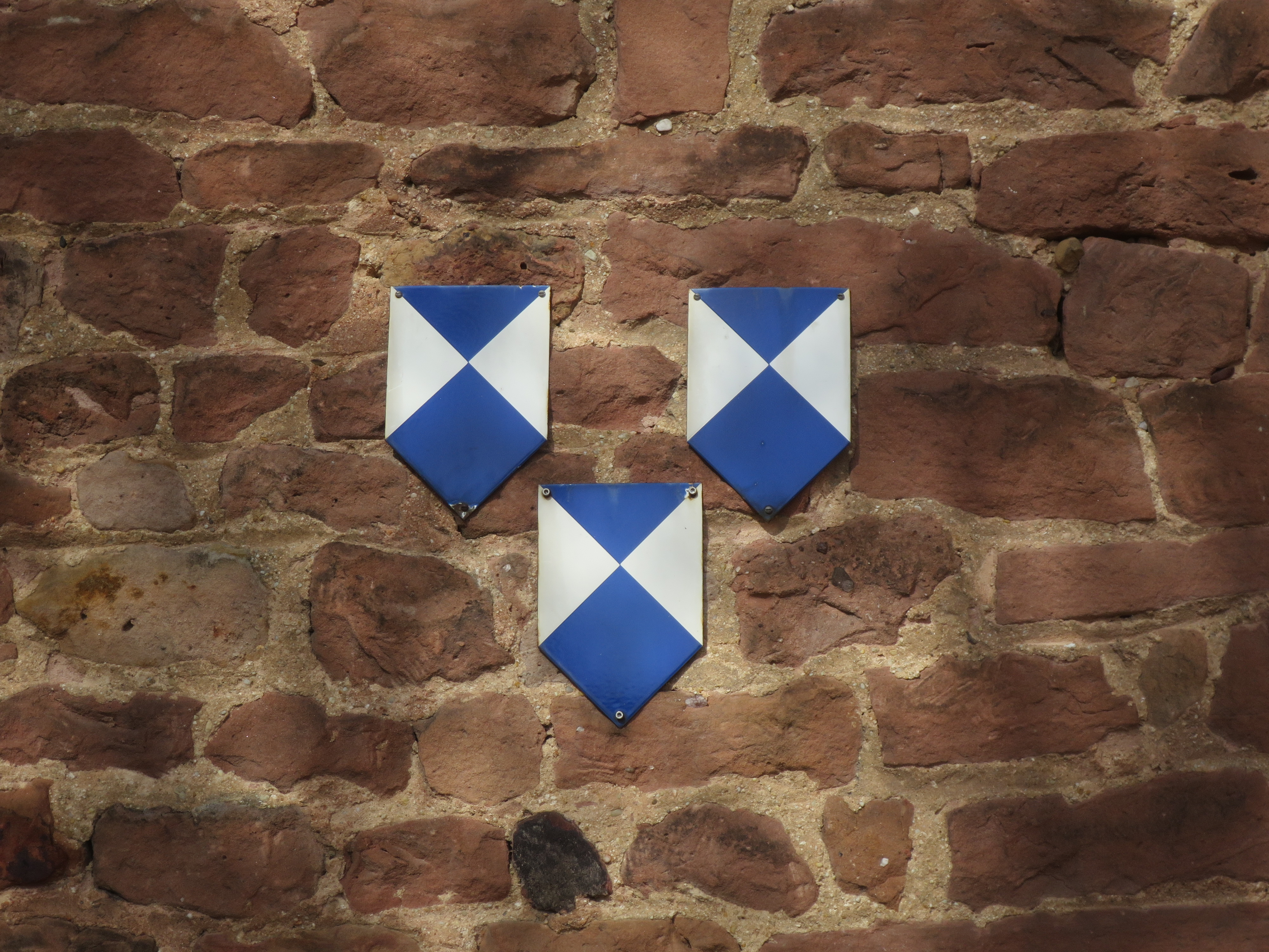 Sonderschutz-Kennzeichnung nach der Haager Konvention zum Schutz von Kulturgut bei bewaffneten Konflikten an der Ruine des Klosters Limburg, Bad Dürkheim (vermutlich: rechtswidrig, da kein Kulturgut-Depot).